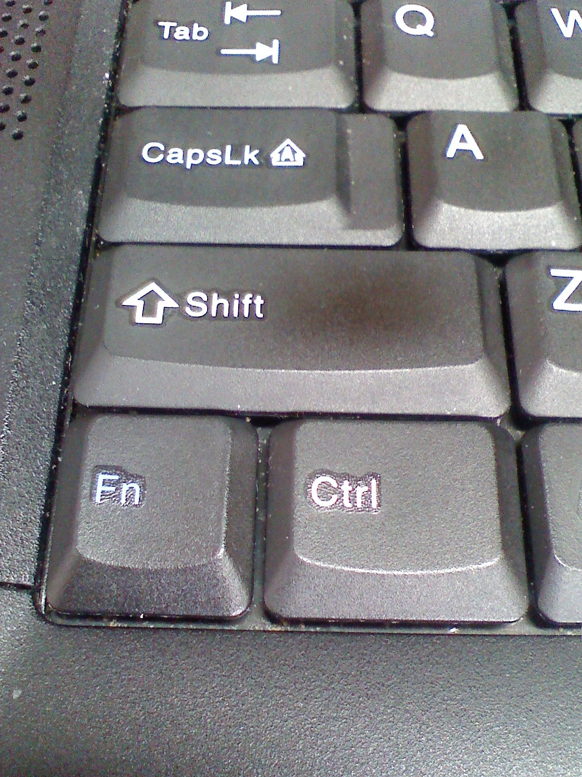 Stirklavo, majuskliga klavo kaj Fn-klavo sur klavaro 中文（香港）: 鍵盤上的Ctrl鍵、Shift鍵及Fn鍵